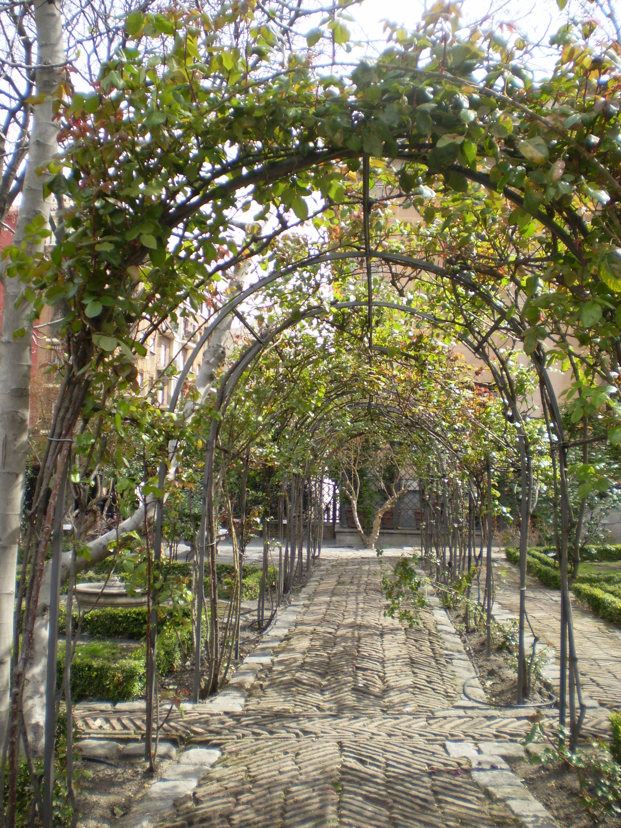 Jardín del Príncipe de Anglona. 18th garden. Madrid, Spain